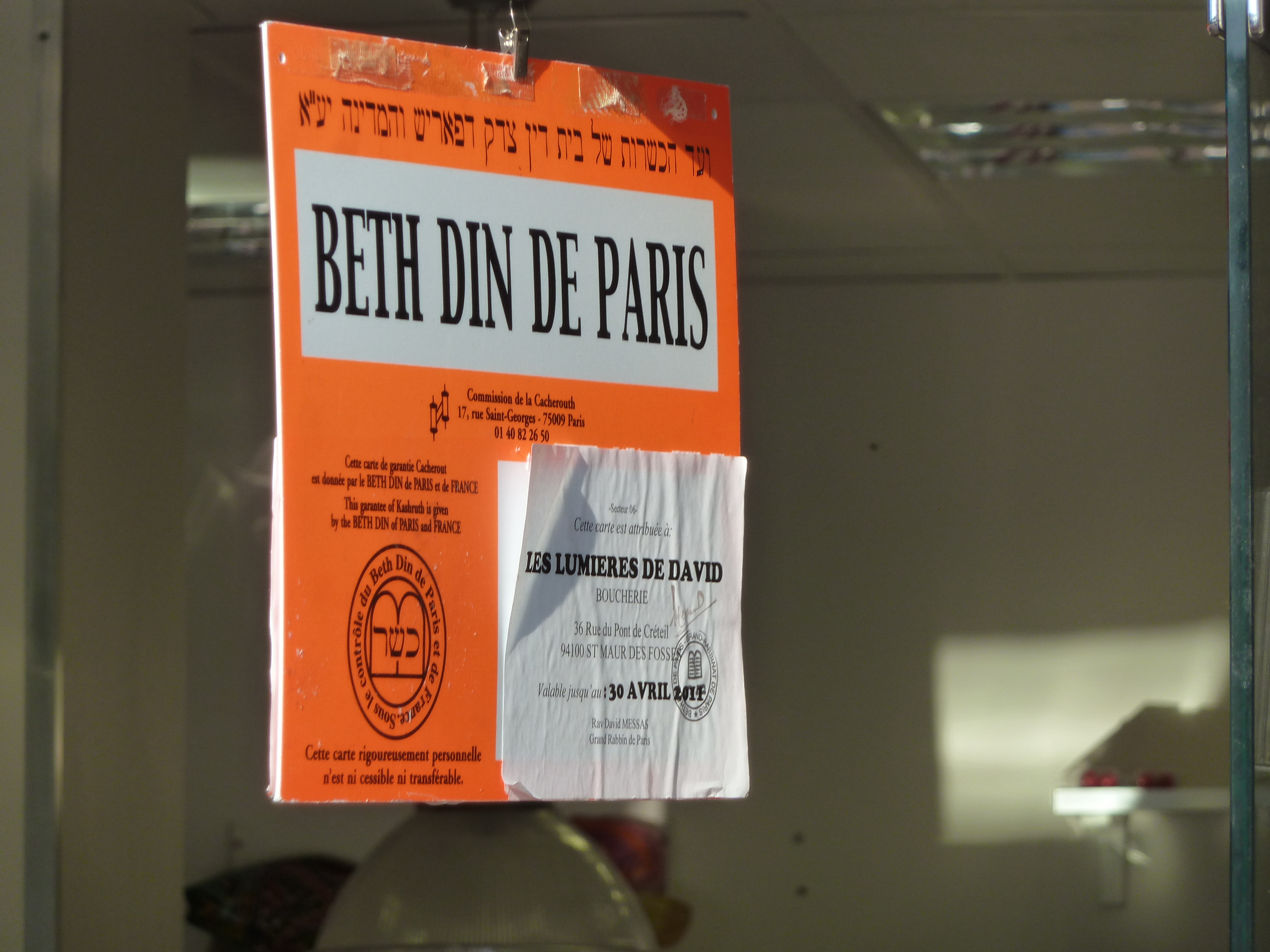 Saint-Maur-des-Fossés - Boucherie "Les lumières de David", 36, rue du Pont de Créteil, 94100 ST MAUR DES FOSSES - certificat de cacheroute (הֶכְשֵׁר Hekhsher) du Beth-Din de Paris. (Quelques années plus tard, cette boucherie cachère est devenue une boucherie hallal)